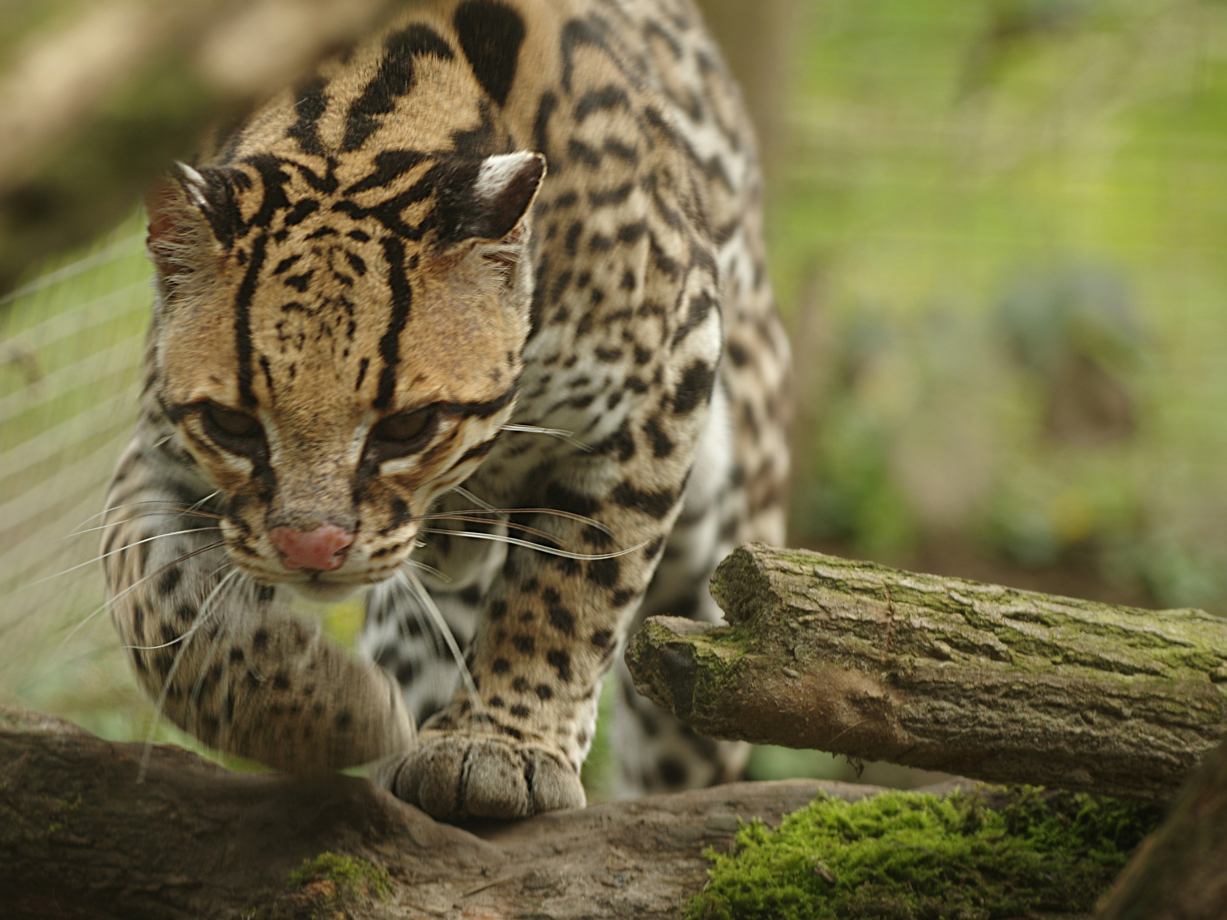 Un Ocelot (Leopardus pardalis) au Parc des Félins.